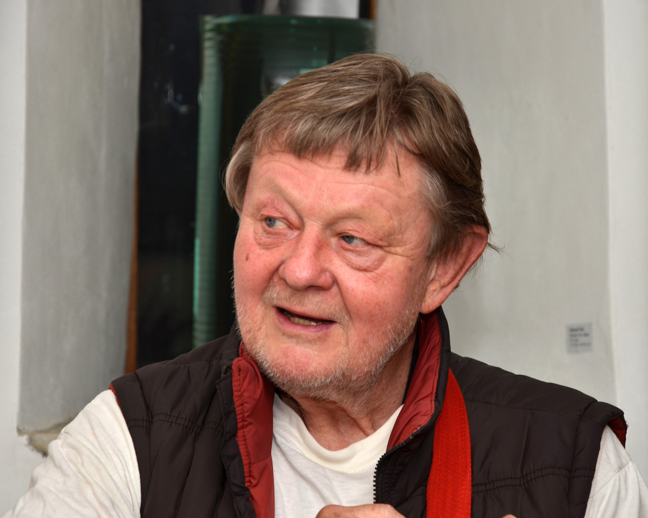 Vladimír Merta (2017)